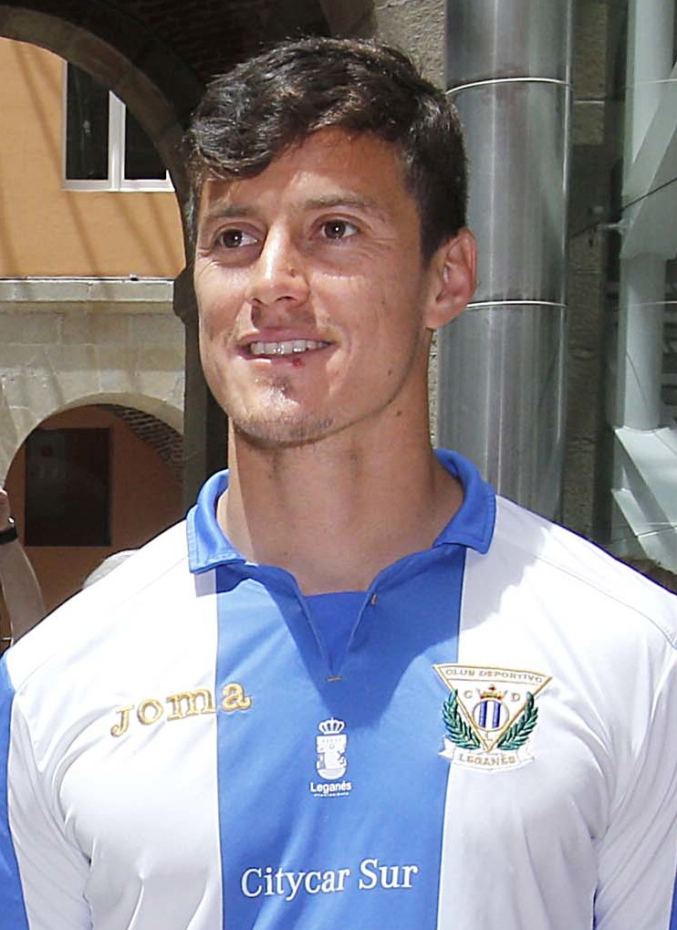 Felicidades pepineros!! Vuestro ascenso a Primera es la historia de un sueño, el resultado de vuestro trabajo y esfuerzo. Sois un orgullo para todo Madrid! Enhorabuena CD Leganés. #LeganésEsDePrimera